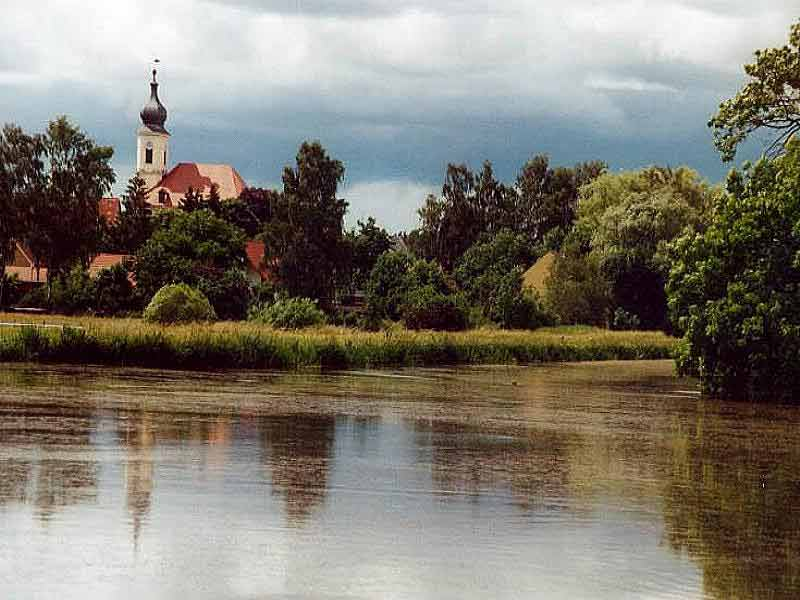 Foto von Unterschwaningen mit Blick auf den künstlichen See und die Kirche